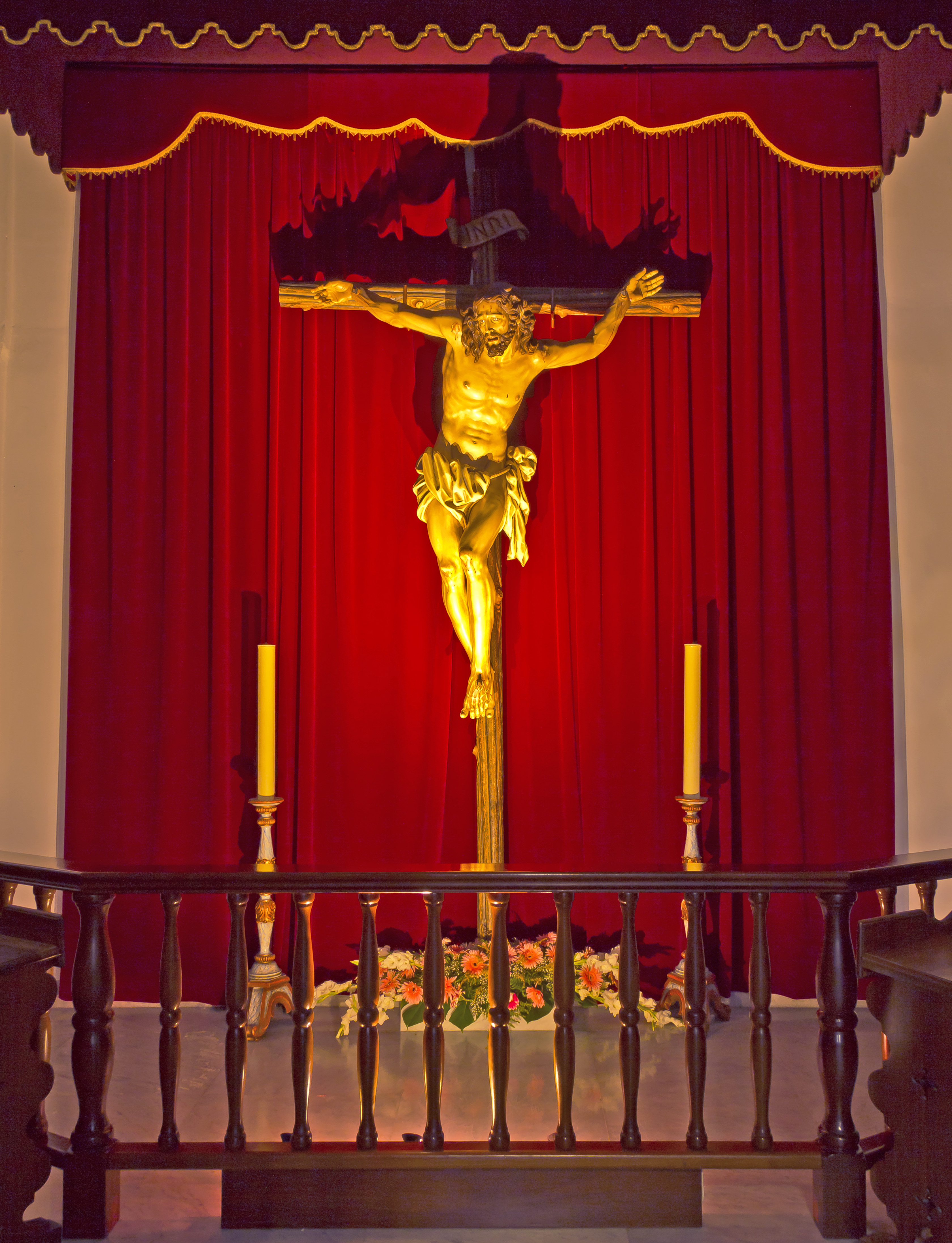 Cristo de la Reconciliación, Basílica de Nuestra Señora de la Candelaria